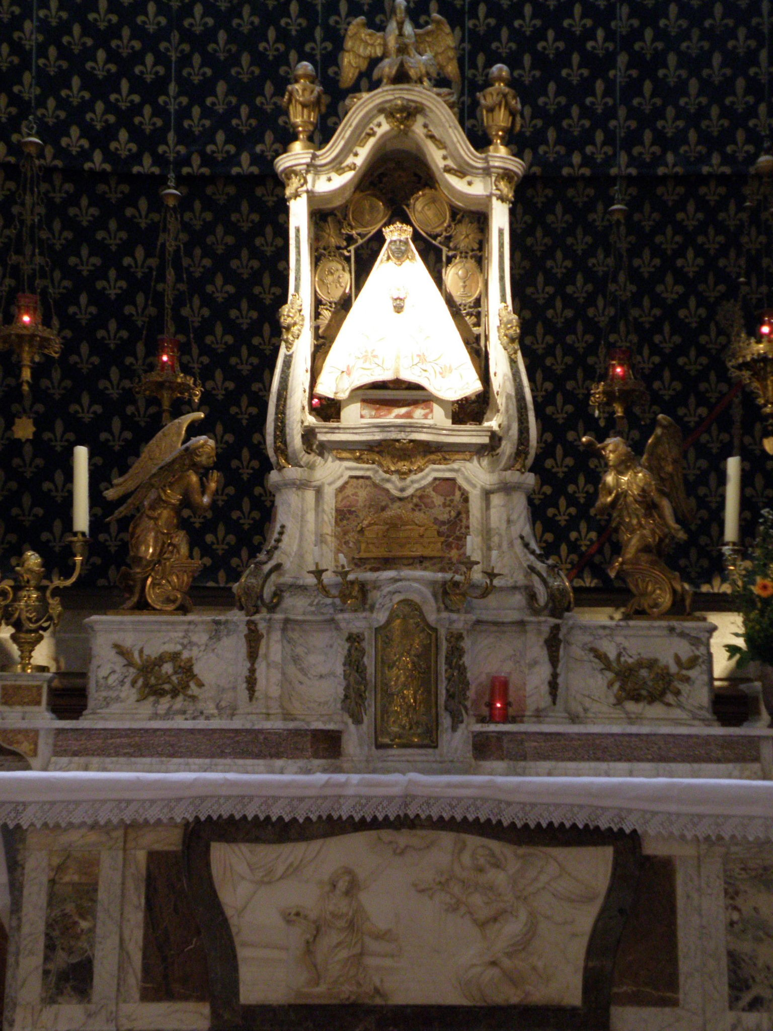 Le Puy-en-Velay, préf. de la Haute-Loire, France, région Auvergne. Cathédrale Notre-Dame, Vierge Noire sur le maître-autel.